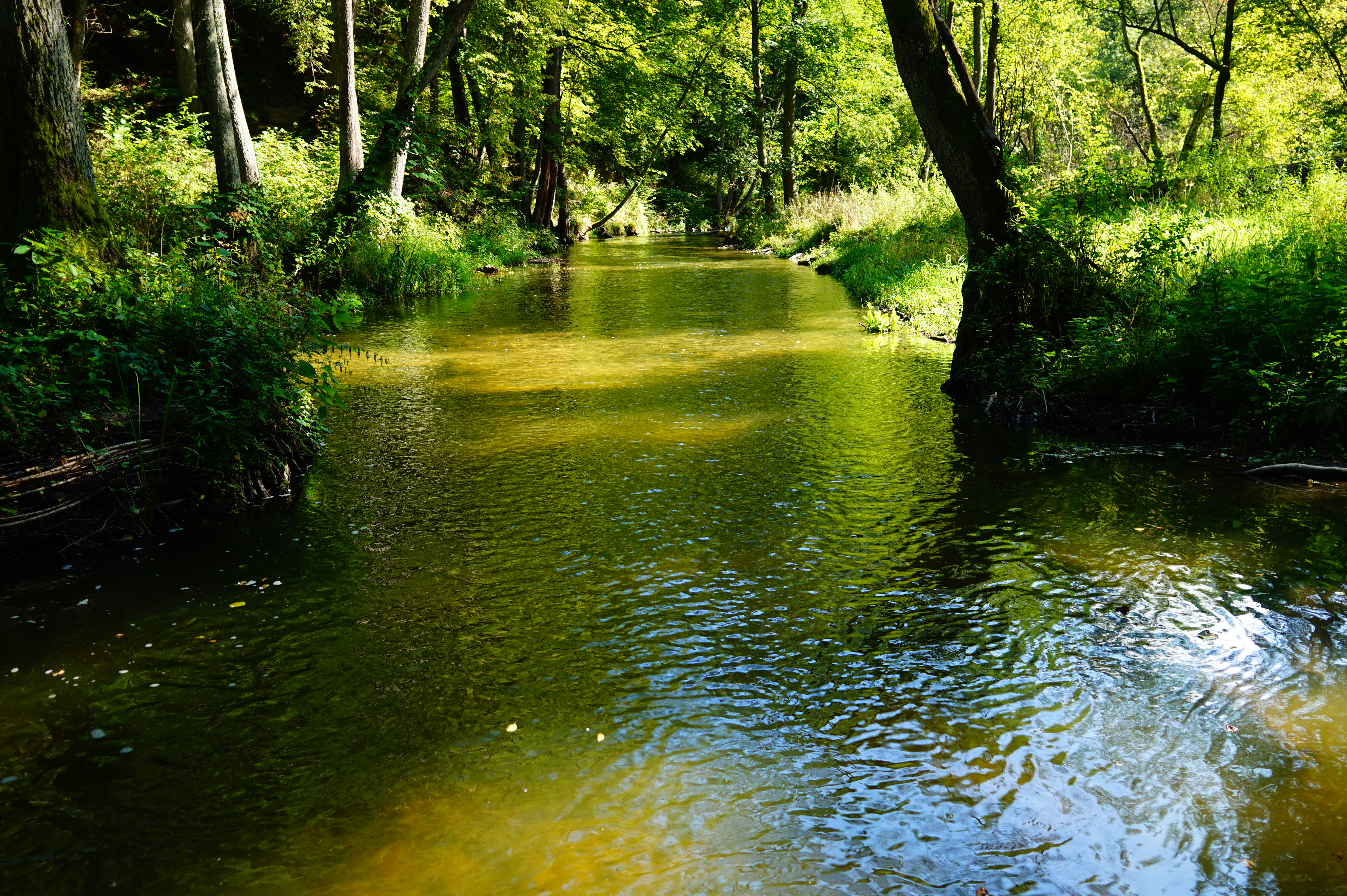 Lidzbark Warmiński, rzeka Symsarna. Okolice ośrodka wypoczynkowego "Zacisze"